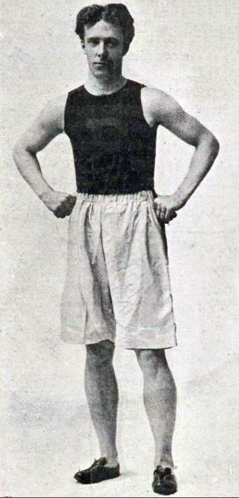 George Orton, champion olympique du 2500 mètres steeple, en 1900.